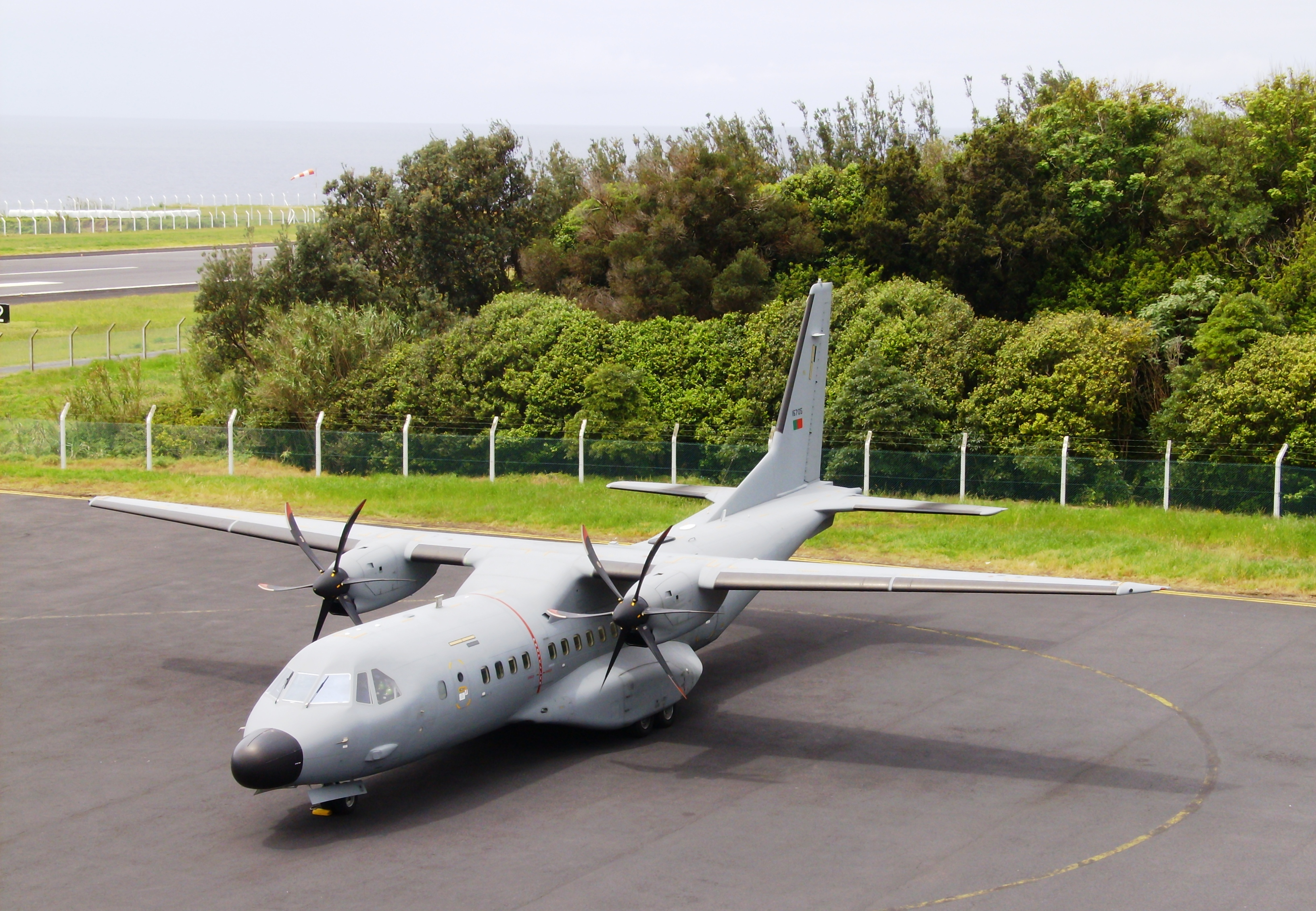 CASA C-295 da Força Aérea Portuguesa no Aeroporto da Horta, ilha do Faial, nos Açores.